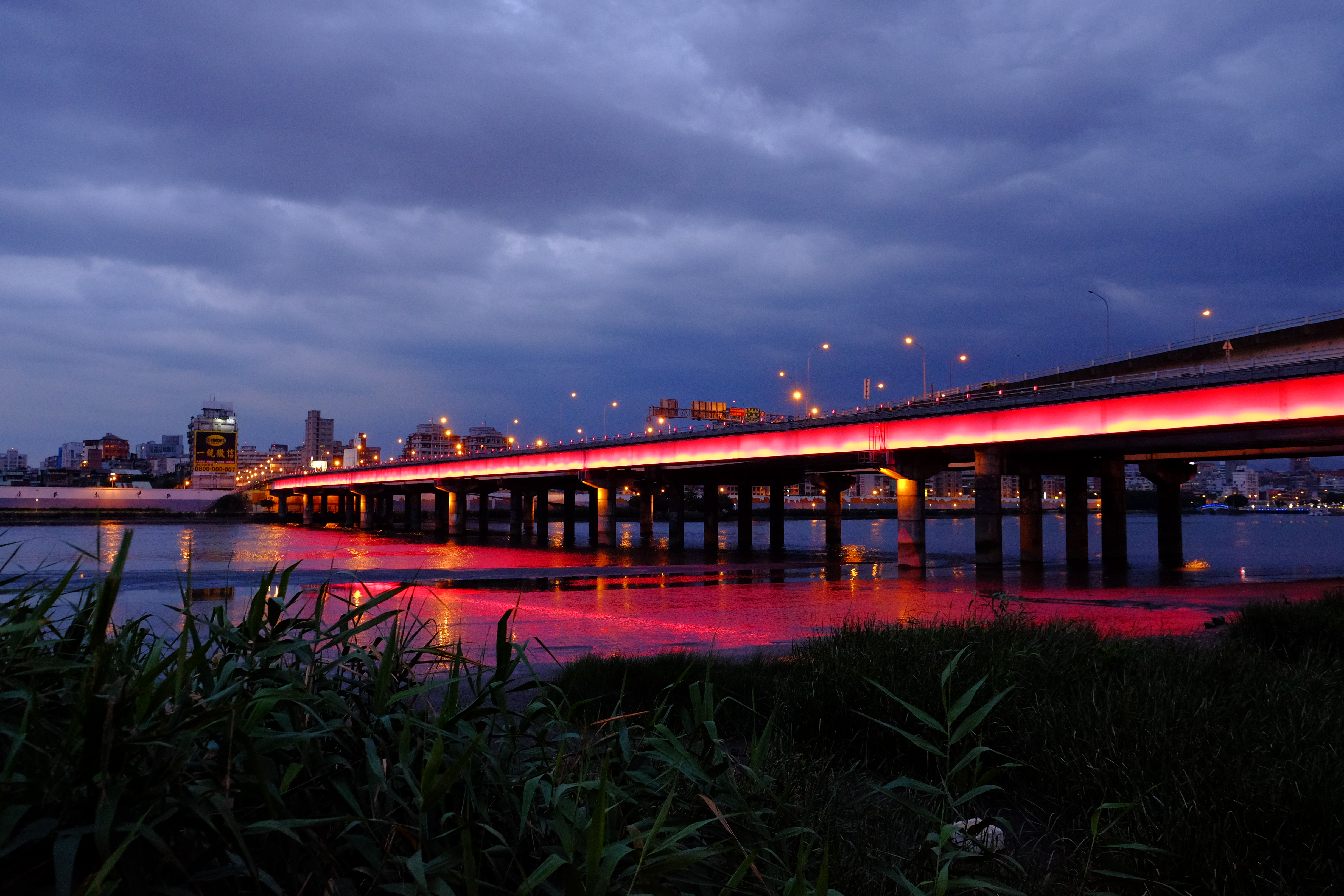 台北橋夜色